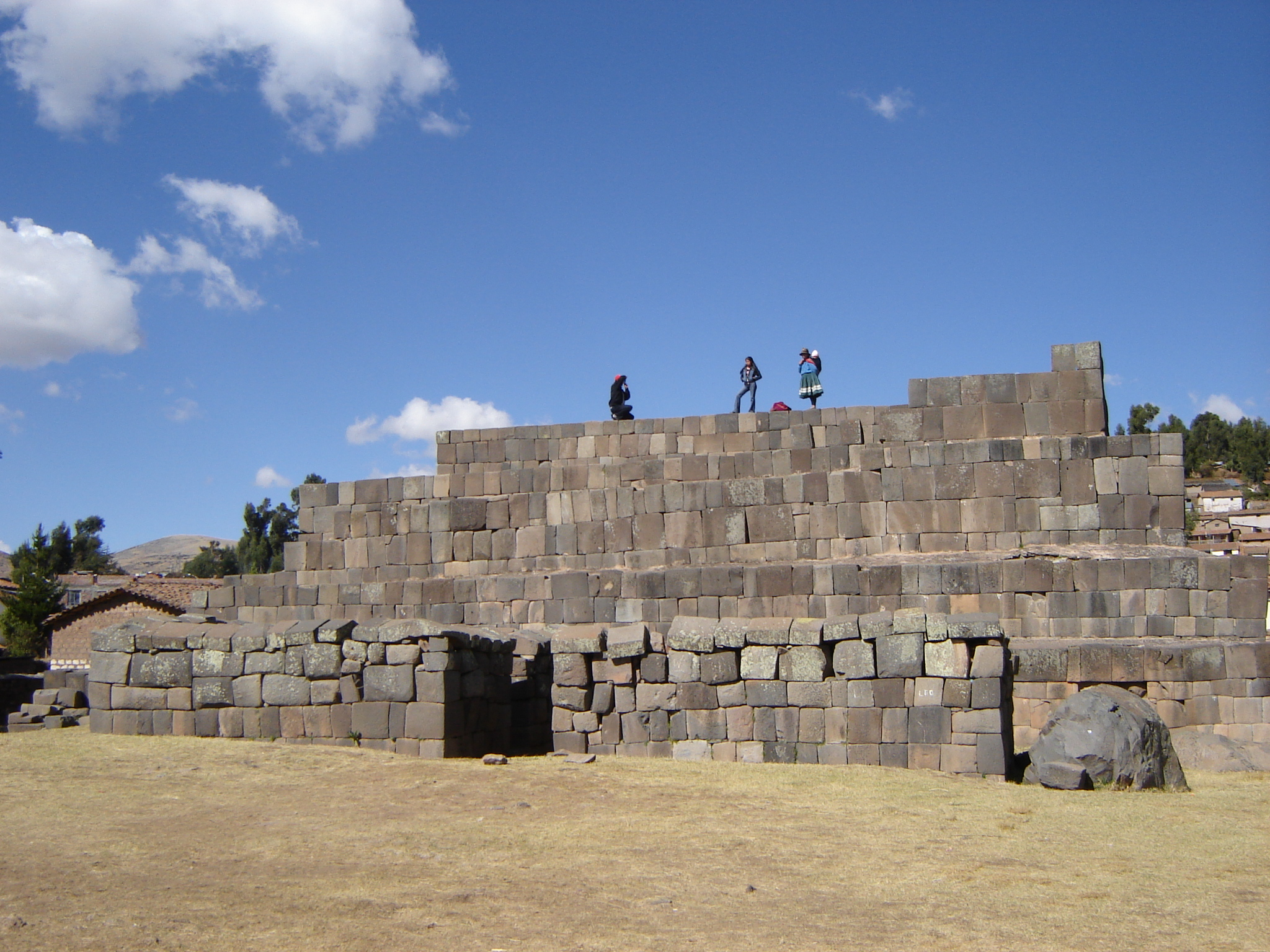 Vilcashuamán ushno (Inca pyramid).